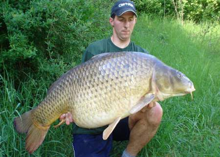 fieldtester (HaKa tackle) mark met weer een mooie karper